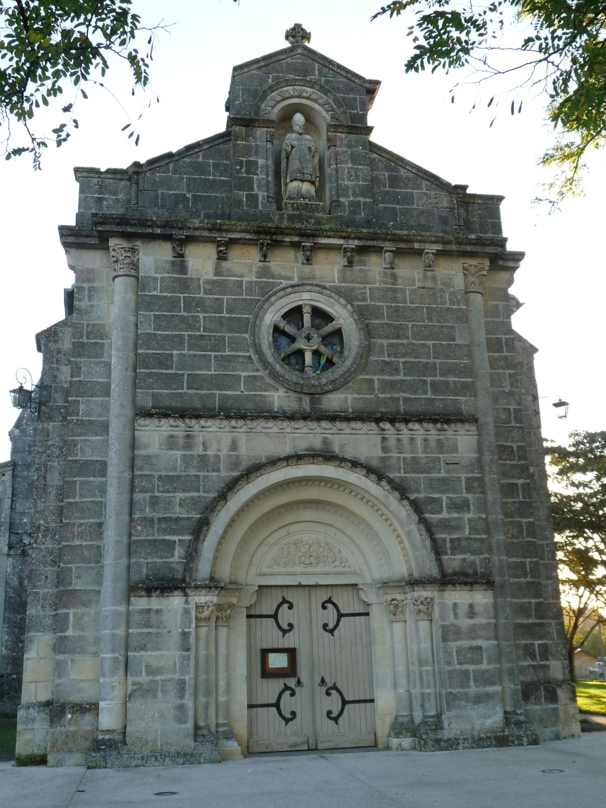 Eglise de Laruscade, Gironde, France